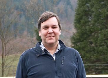 Foto di William Crawley-Boevey